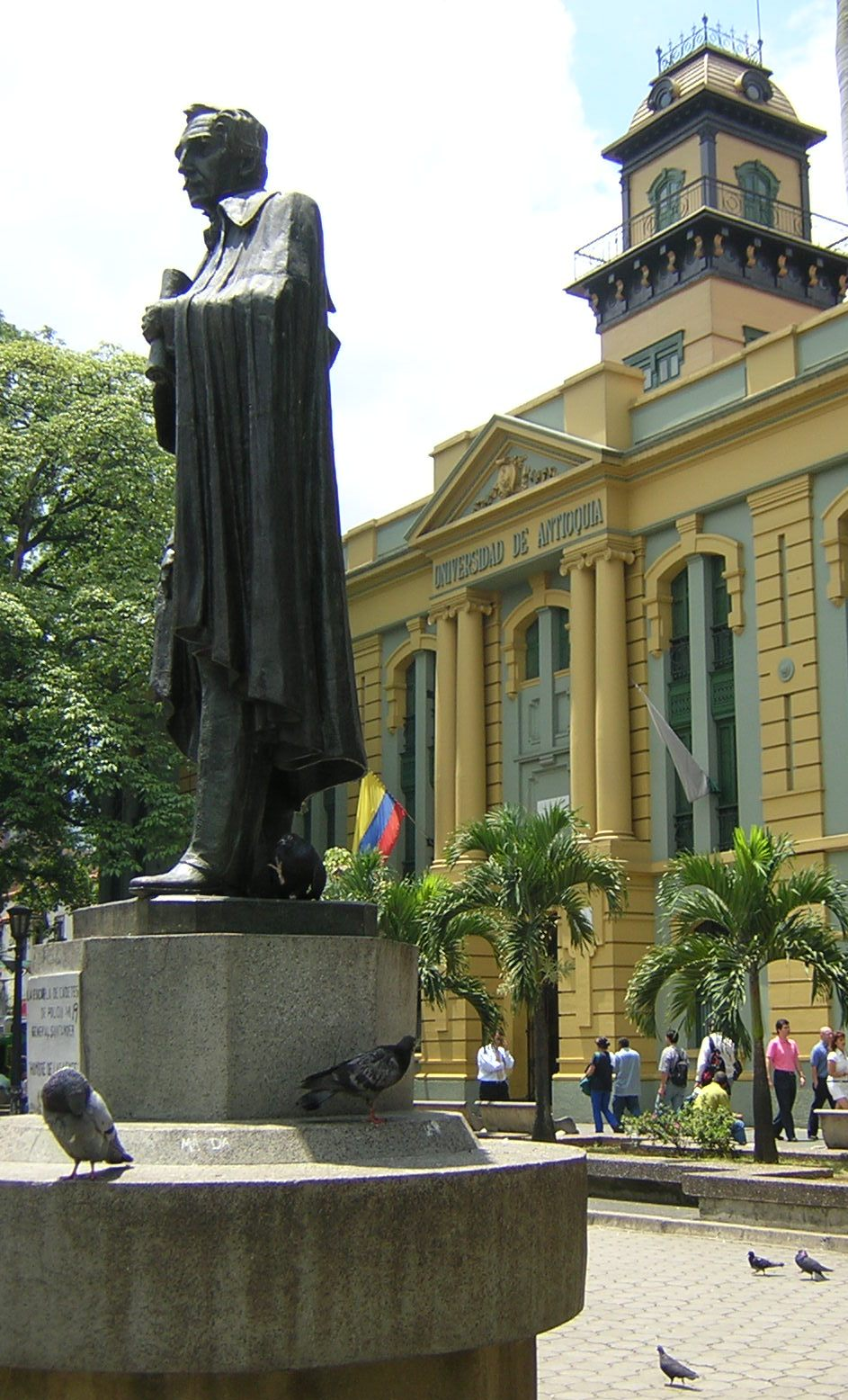 Estatua de Francisco de Paula Santander, y al fondo Edificio San Ignacio ubicado en la Plazuela San Ignaco, Medellín, Colombia.